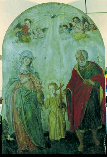 Святая Сям’я. Першая палова XVII ст. З в. Шылавічы Ваўкавыскага р-на. Музей старажытнабеларускай культуры IМЭФ НАН Беларусі